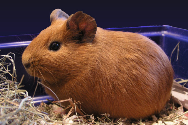 Cavia, (Cavia porcellus). (foto E. van Herk, 2004) Dit is geen raszuivere cavia, maar ze kan misschien het best worden omschreven als een eenkleurige rode korthaar. Haar naam is overigens Woezel. Ze is hier nog niet volwassen, leeftijd 2-3 maanden.